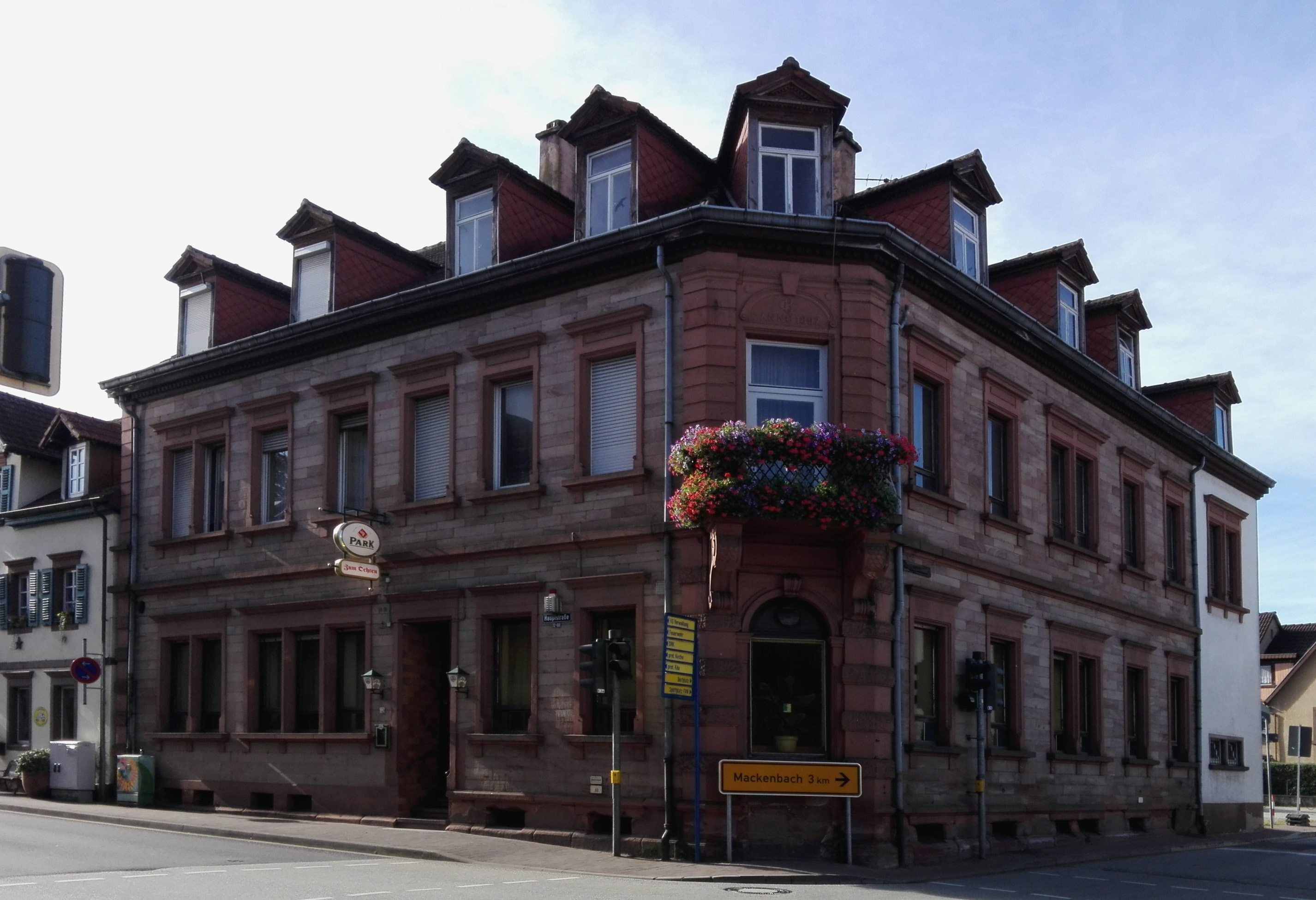 gründerzeitlicher Sandsteinquaderbau, bezeichnet 1897